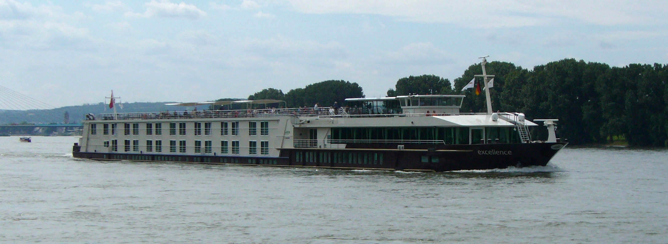 Kabinenschiff Excellence